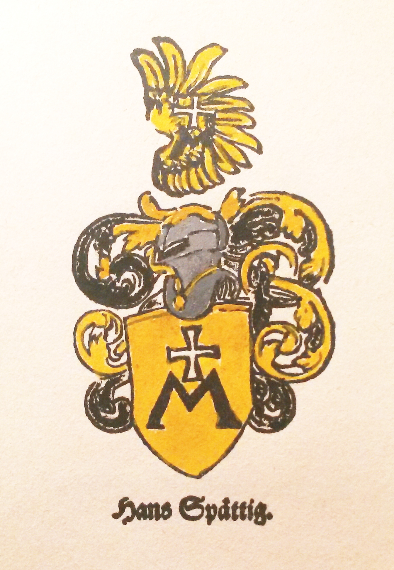 Waltter, Hans Spättig